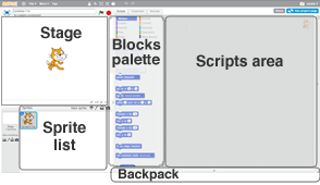 Потребителски интерфейс на Скрач